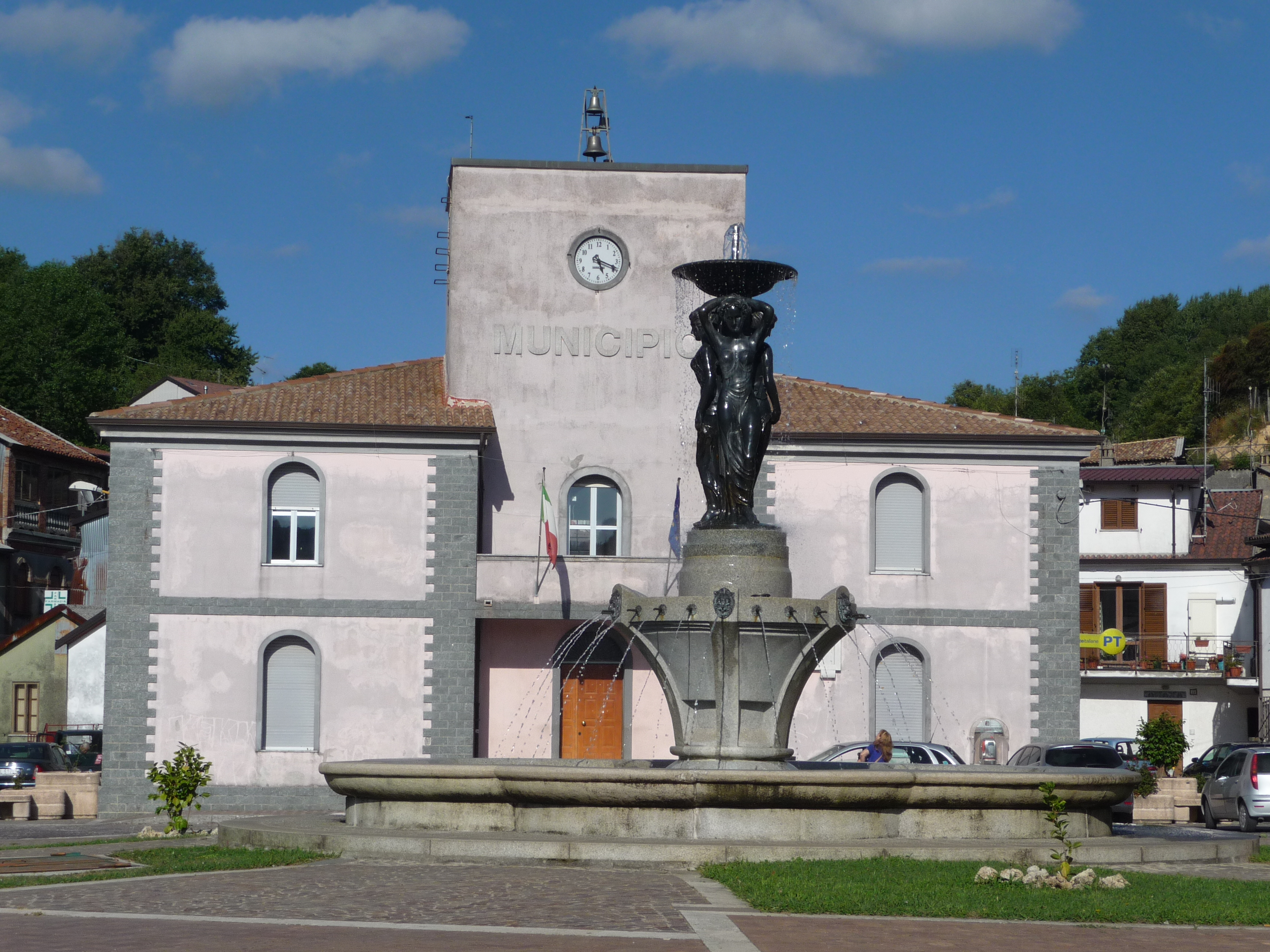 Comune di Brognaturo